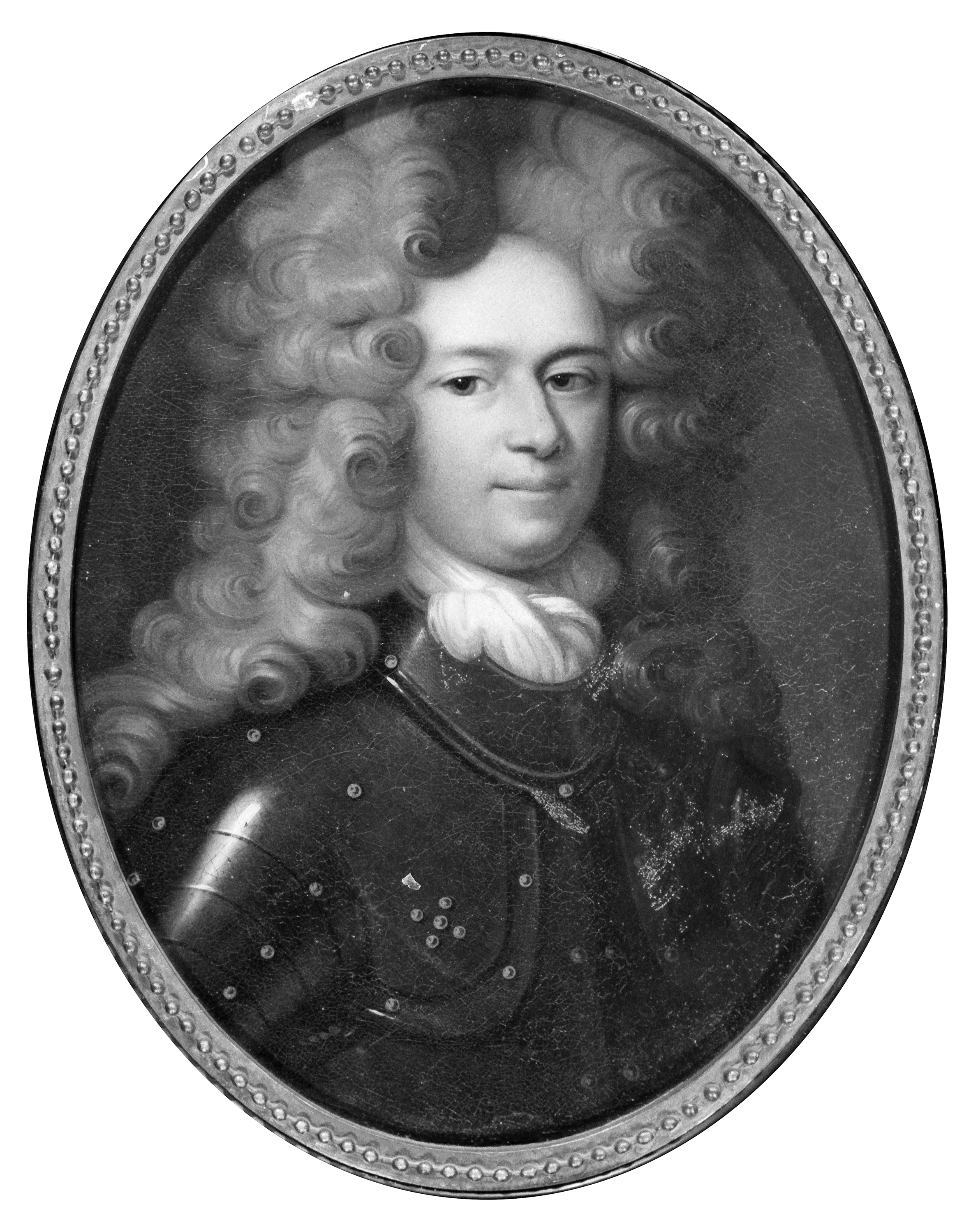 Pieter Hieronymus Ripperda, heer van Beurse en Petkum